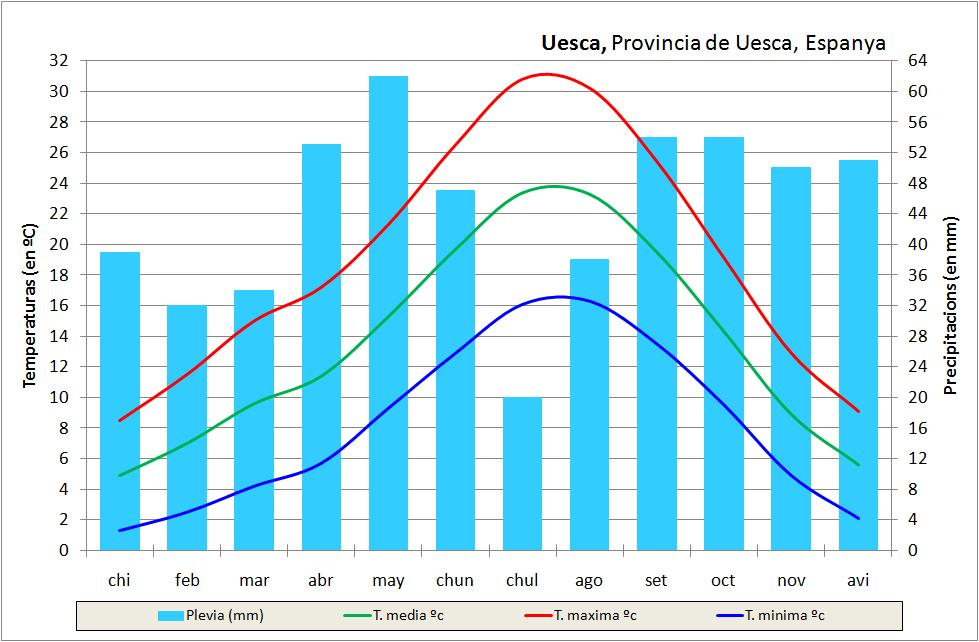 Aragonés: Climograma de Uesca